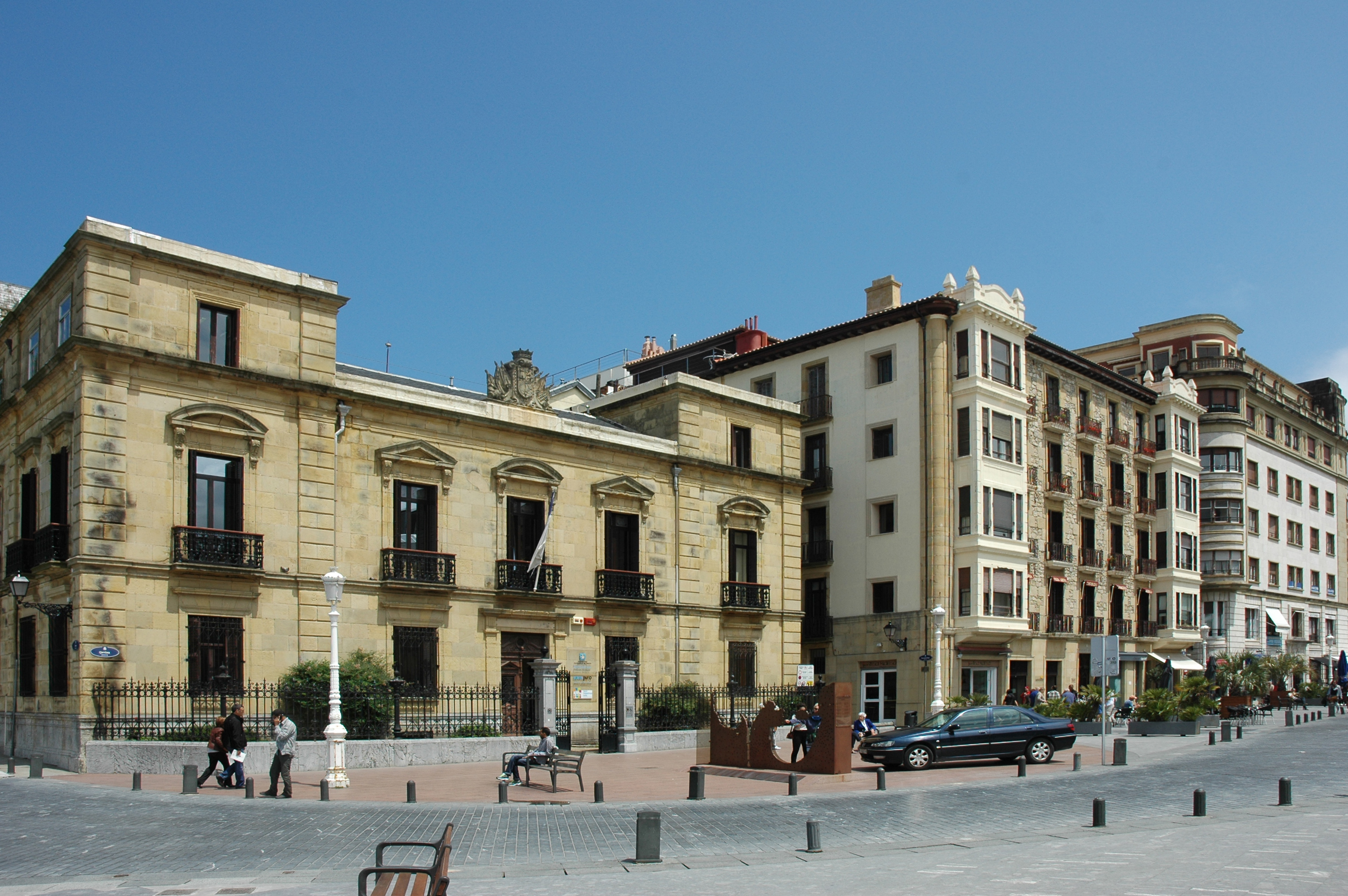 Ijentea Kalea